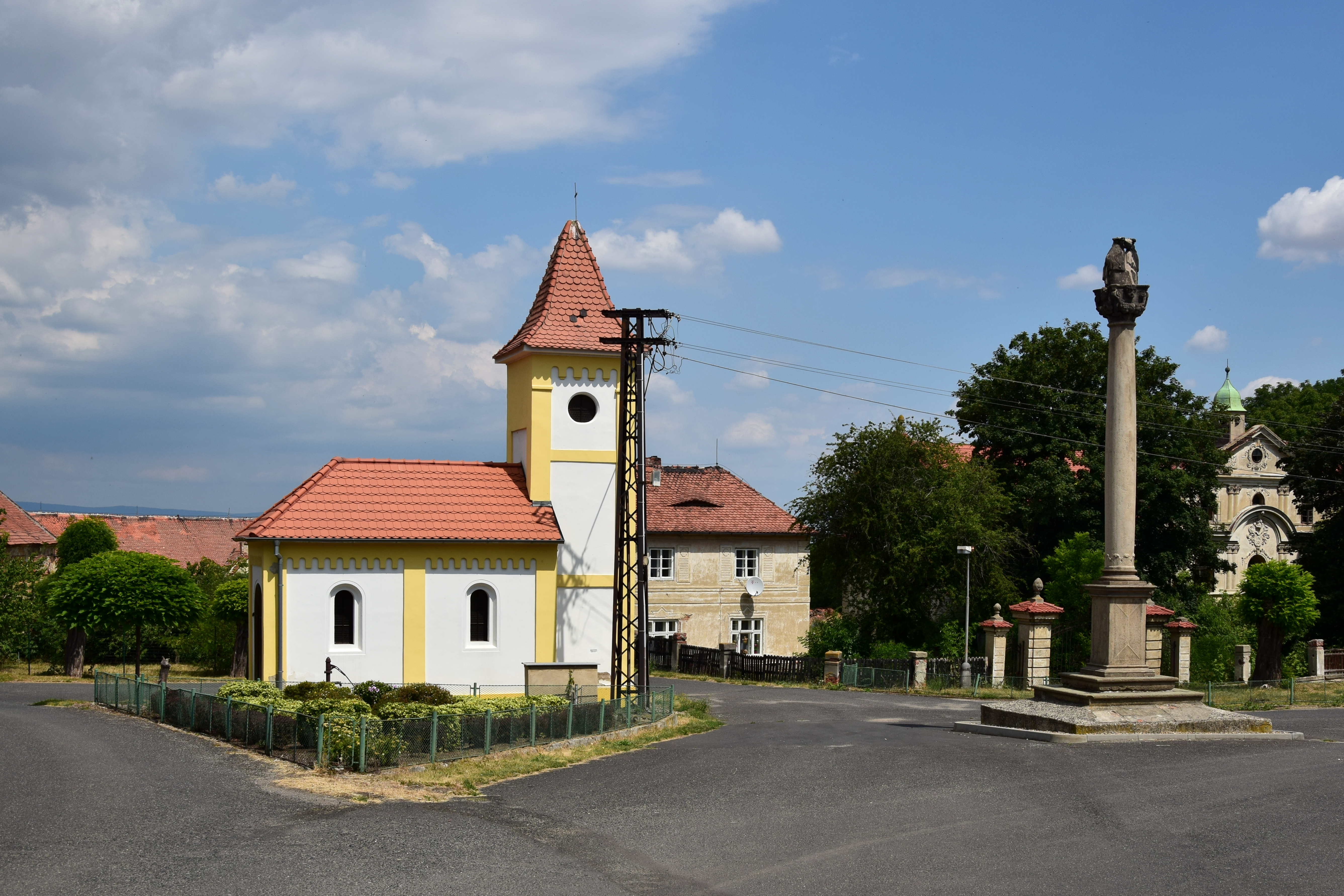 Sloup se sousoším Nejsvětější Trojice, náves před zámkem, Poláky.